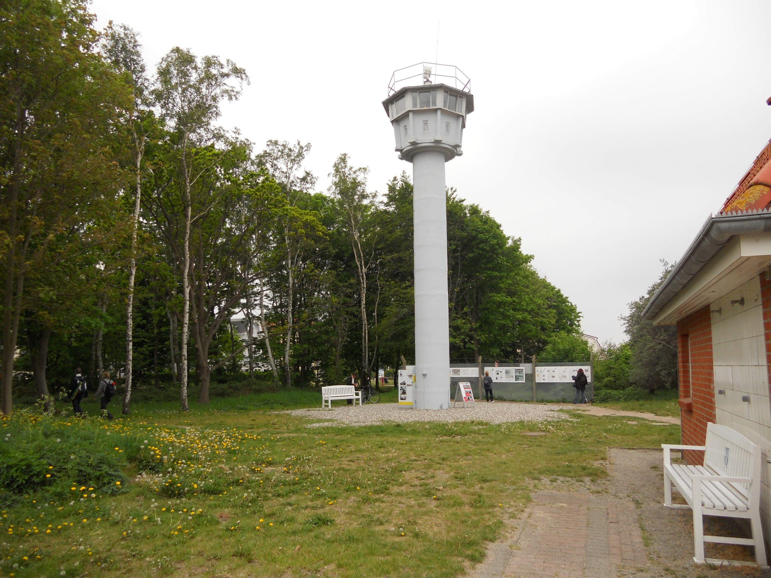 Denkmal, Wachturm Kühlungsborn